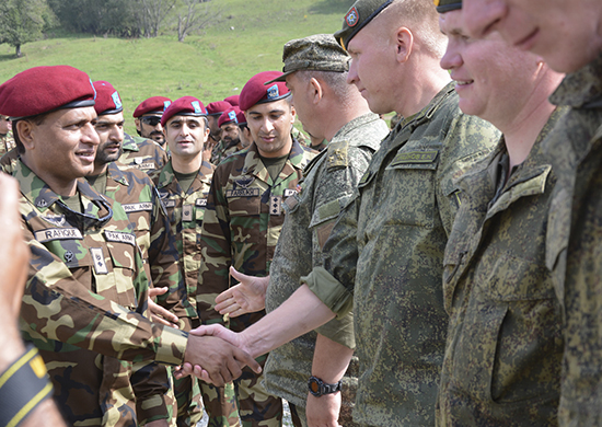 В Карачаево-Черкесии стартовало совместное российско-пакистанское учение «Дружба-2017»